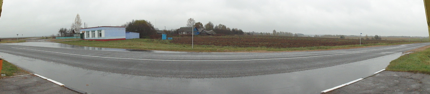 Стёхово